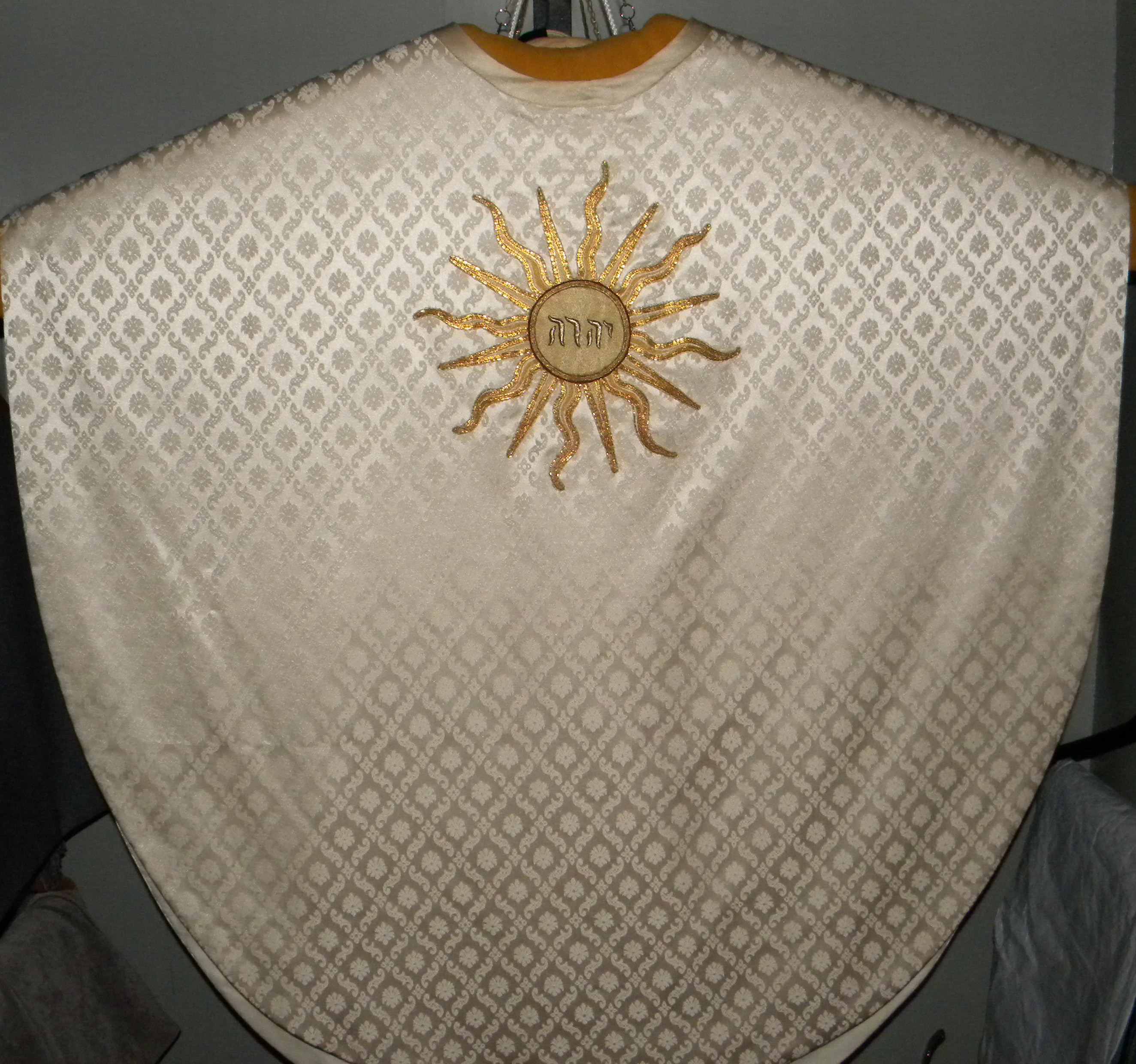 Botkyrka kyrka - Mässhake med tetragrammet JHWH på framsidans solsymbol